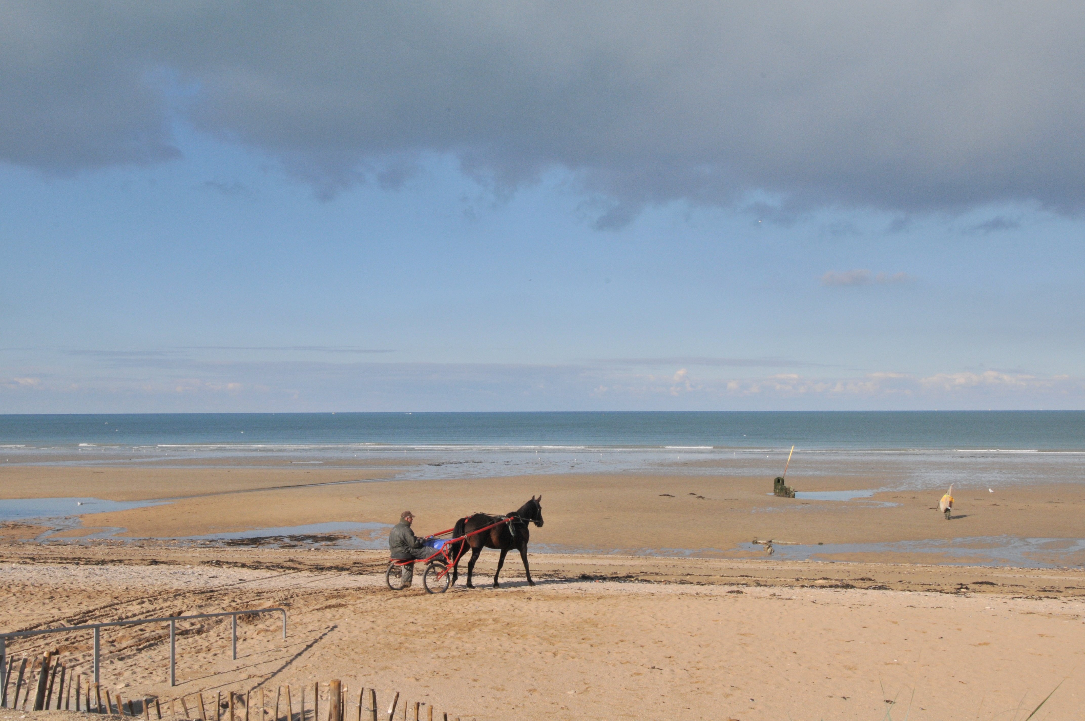 plage d'Hermanville-sur-Mer (Calvados, Basse-Normandie).